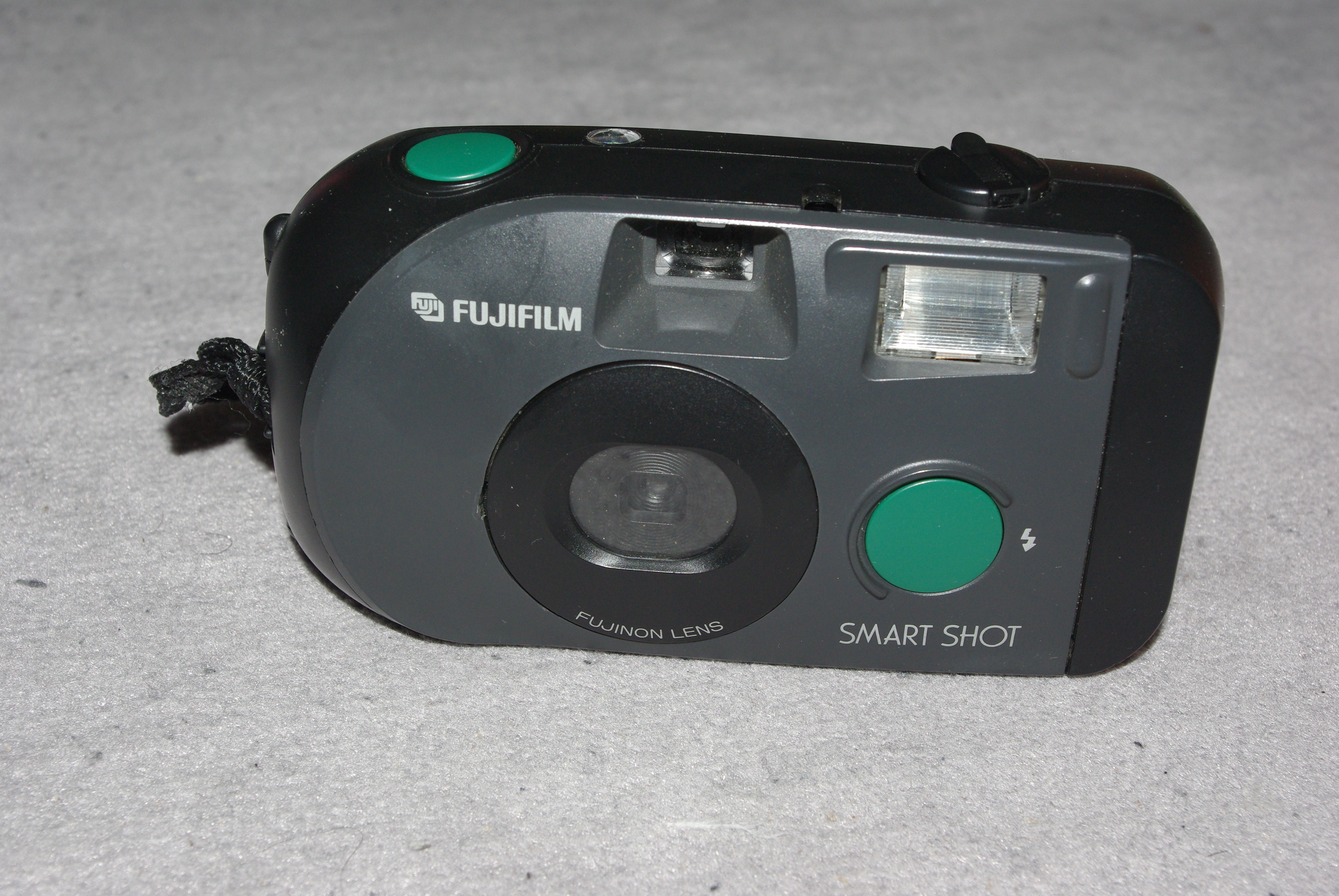 撮影者本人の所有する写真機です。1999年ごろ購入。